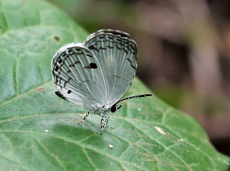 Quaker Neopithecops zalmora in Kolkata, West Bengal, India.